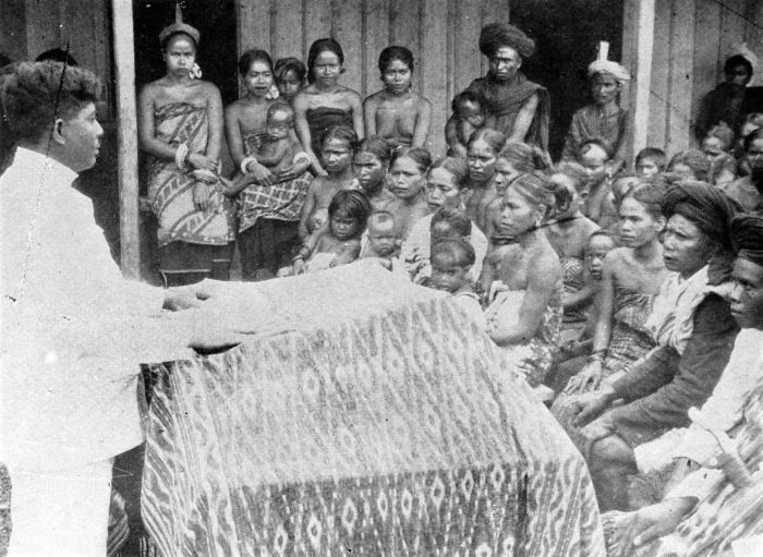 Repronegatief. Evangelieprediking door de guru-injil van Tenggaba in een lokale kerk op Sumba.